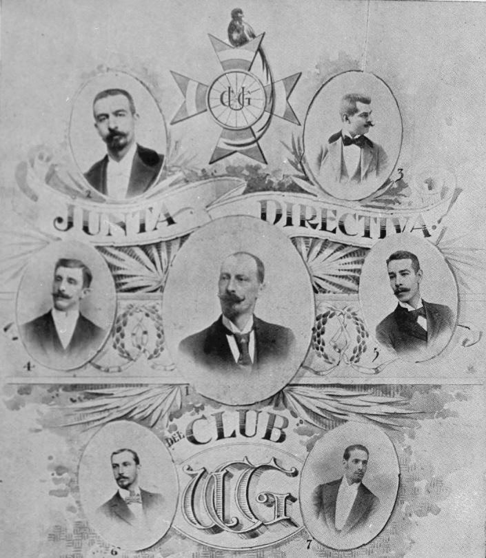 Miembros de la junta directive del la Unión Ciclista de Guatemala en 1896.